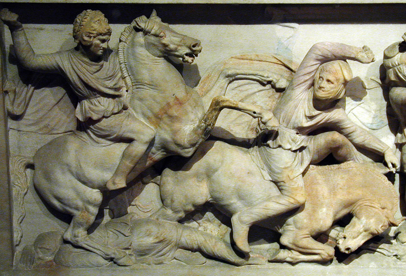 Alejandro Magno (Sarcófago, Museo Arqueológico de Estambul) Alexander on horse at the battle of Issos (Alexander Sarcophagus, Istanbul Archaeological Museum). Photograph taken by Marsyas on 06/09/2000. fr:"sarcophage d'alexandre" dédié au roi Abdalonimos, fin IV av.J-C.